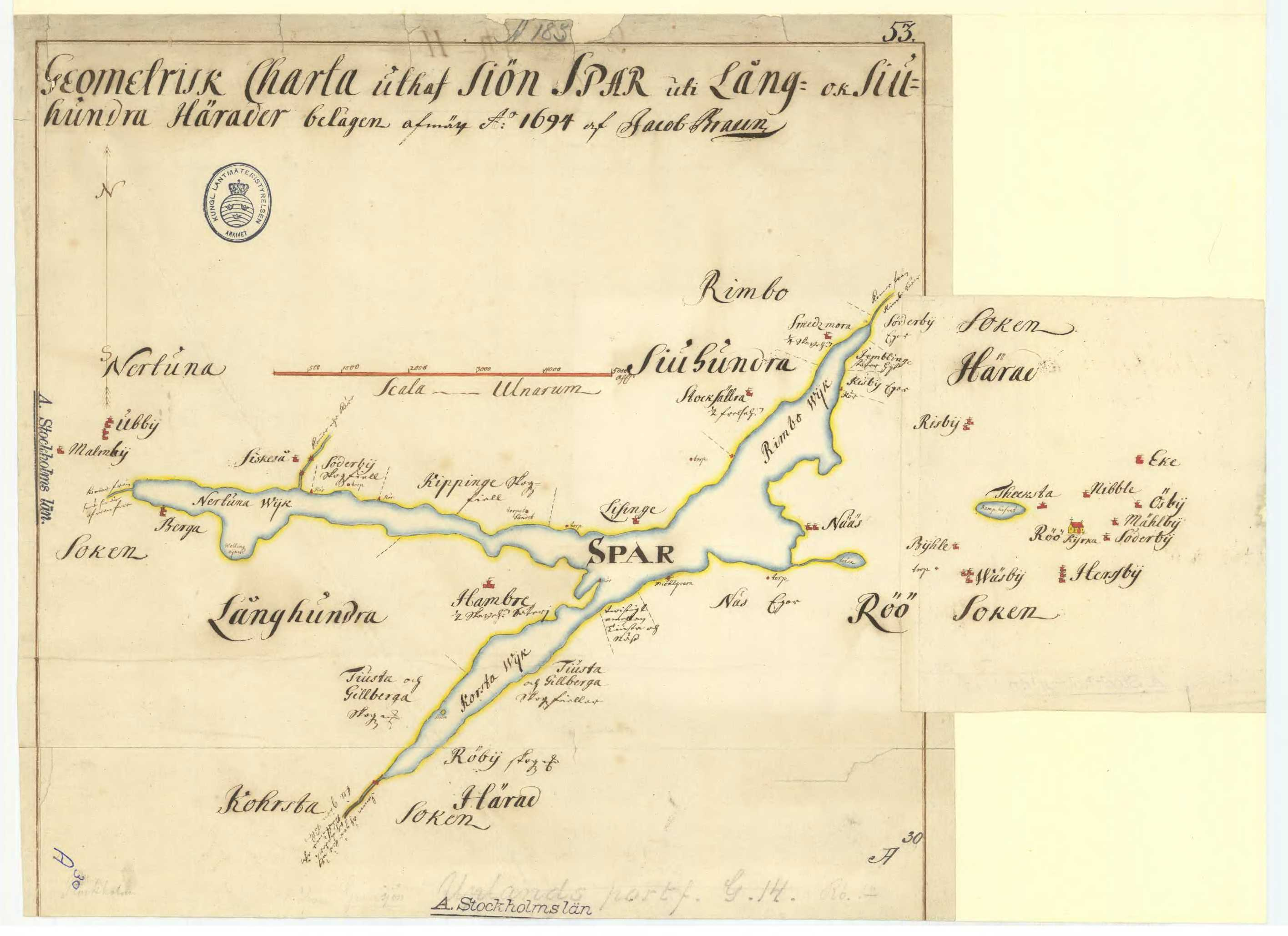 Gammal karta över sjön Sparren.